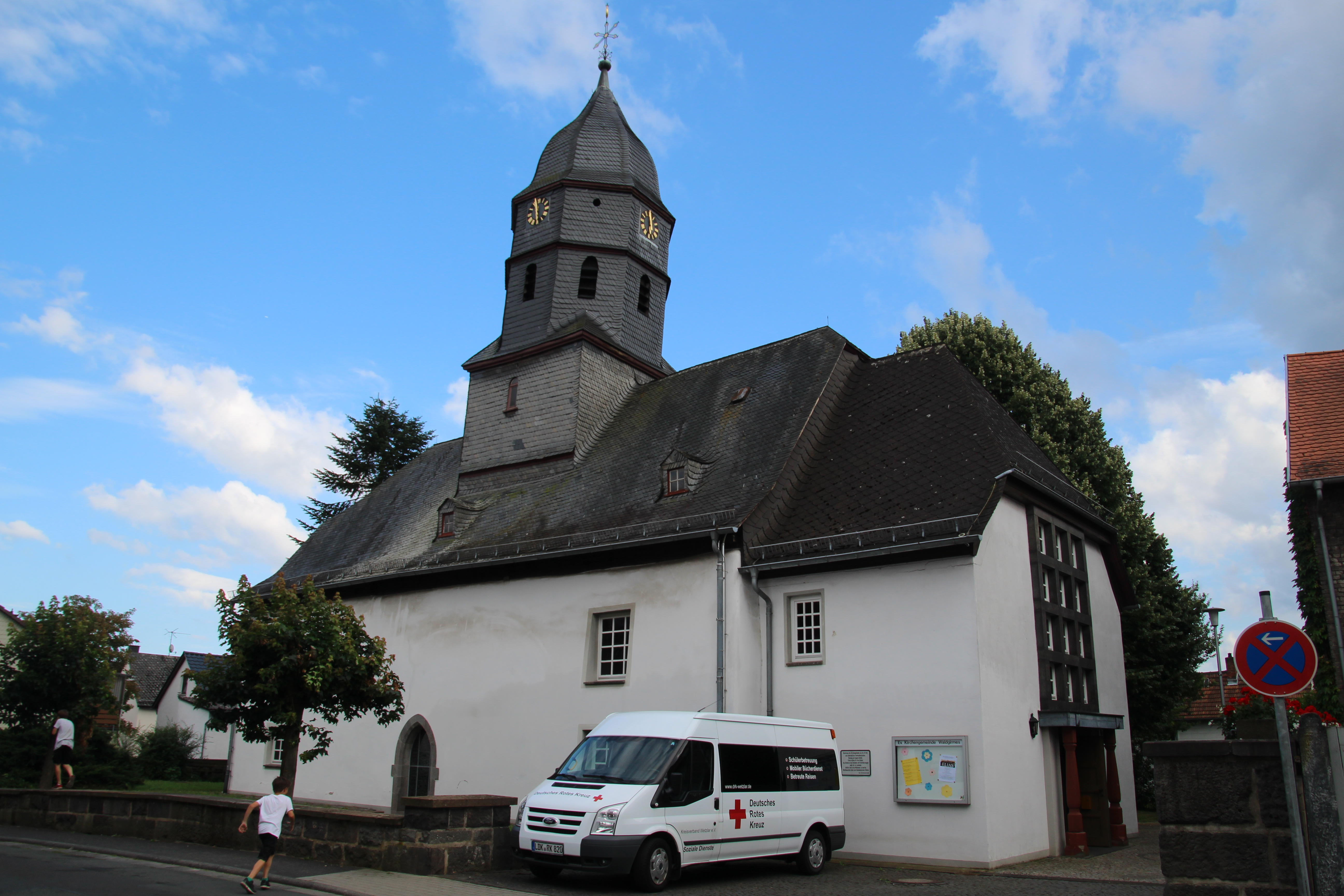 Siehe Foto, Dateiname, Kategorien u. ggf. Geo-Koordinaten